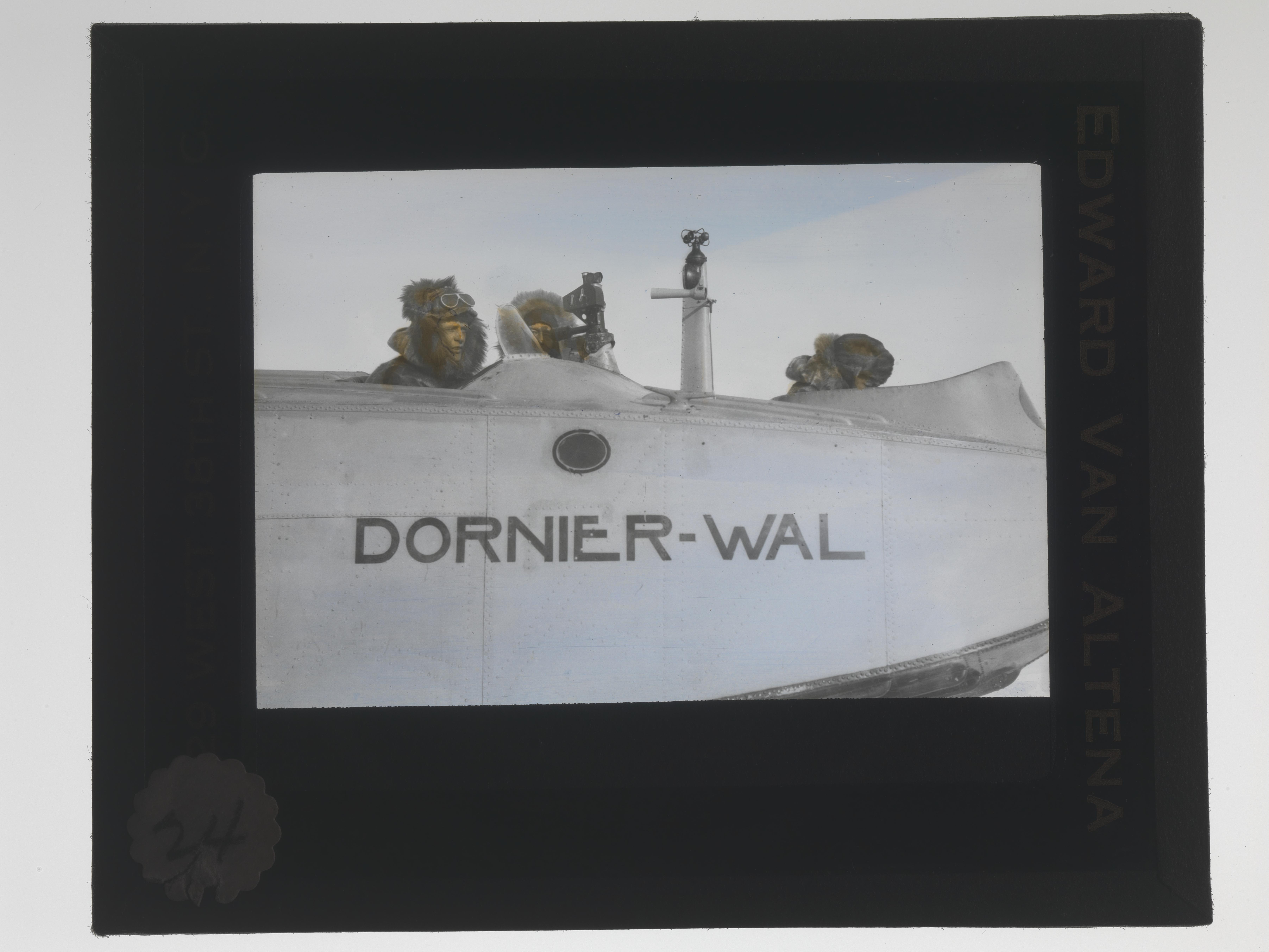 Bildet er hentet fra Nasjonalbibliotekets bildesamling. Anmerkninger til bildet var: Tittel hentet fra den gamle Amundsen-basen Depicted person: Dietrichson, Leif Ragnar Depicted person: Ellsworth, Lincoln Depicted person: Omdal, Oskar